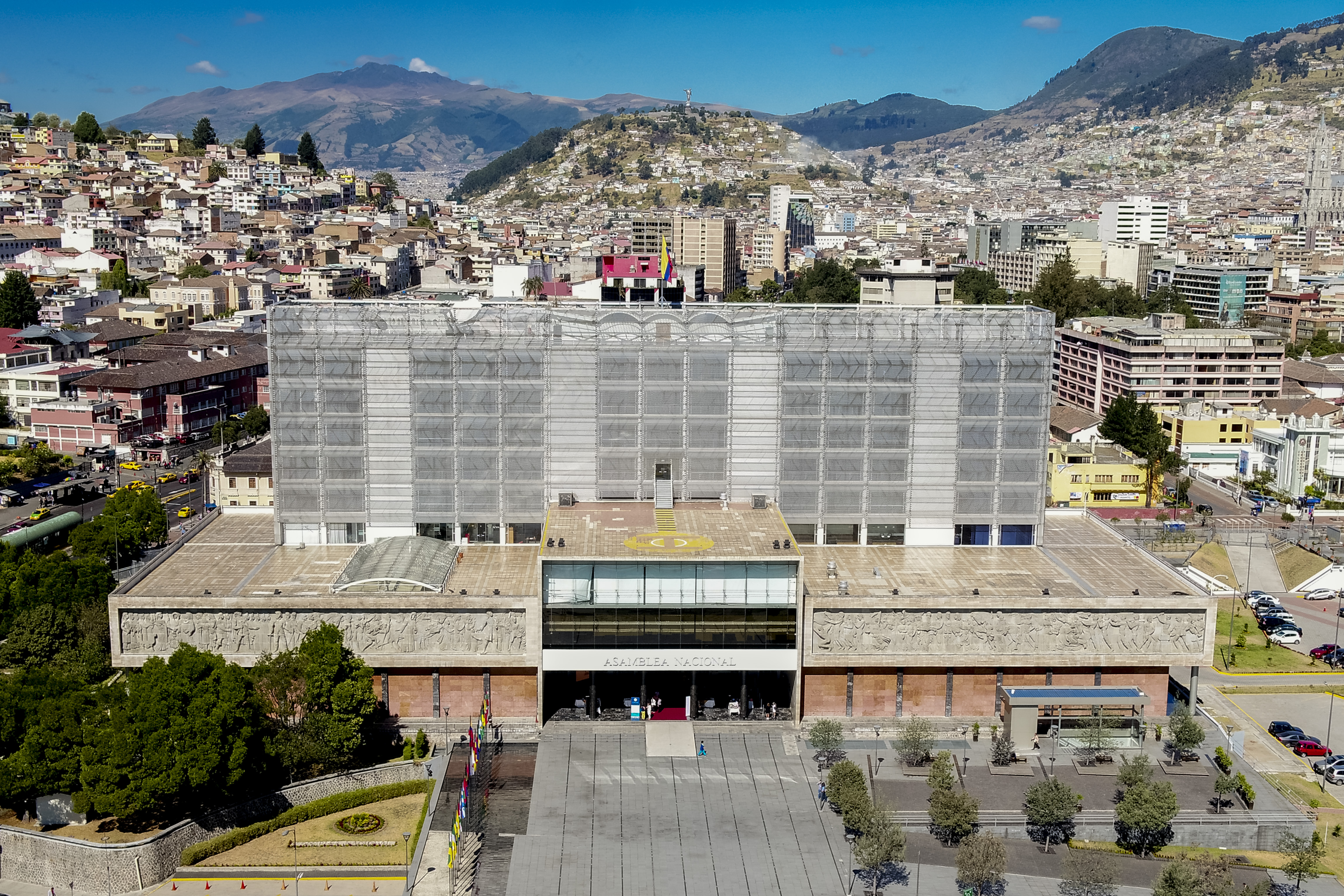 Quito, 20 de Agosto 2019. Fachada de la Asamblea Nacional. Foto Juan José Carvajal / Asamblea Nacional